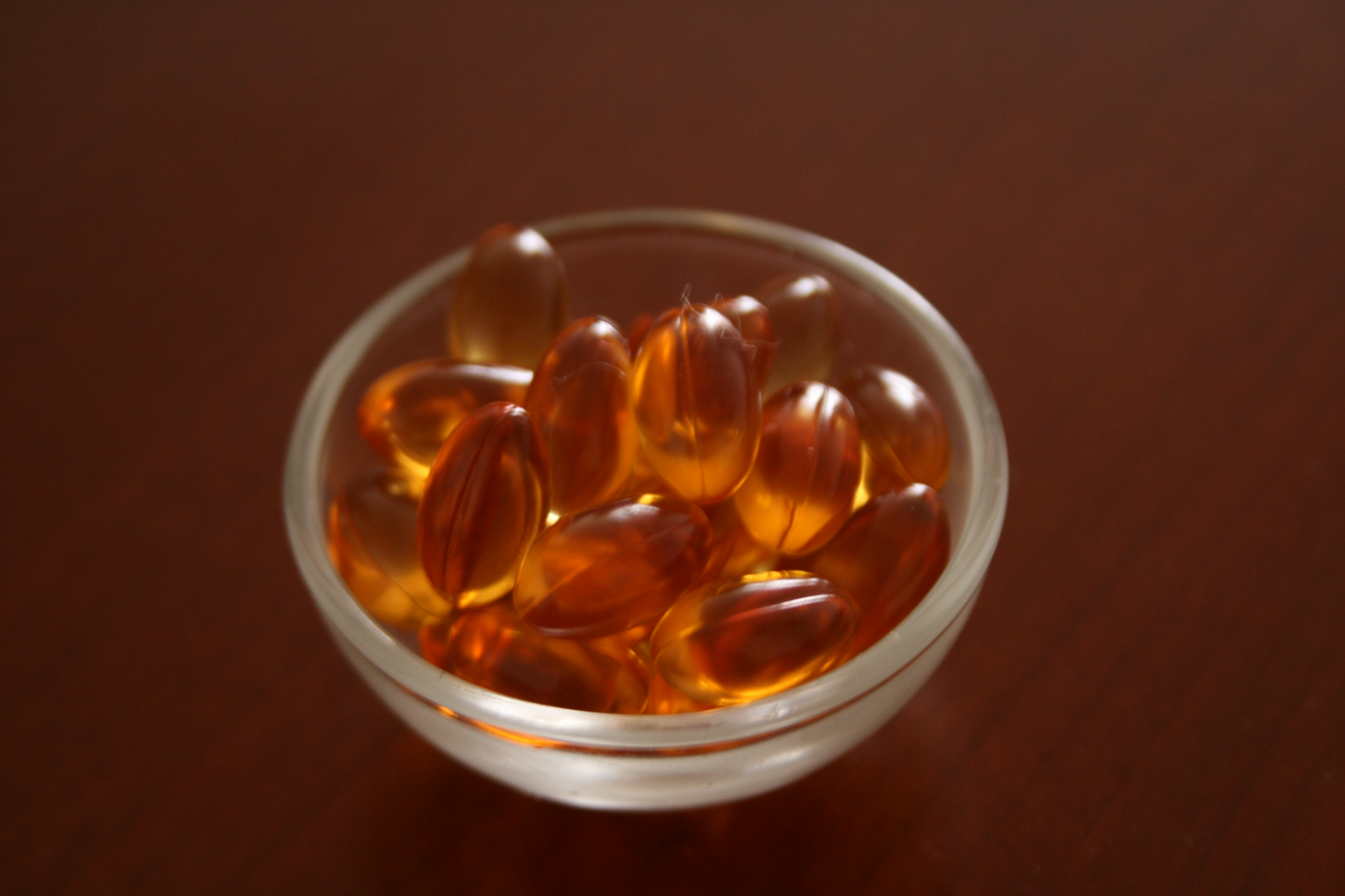 Suplemento de Vitamina E